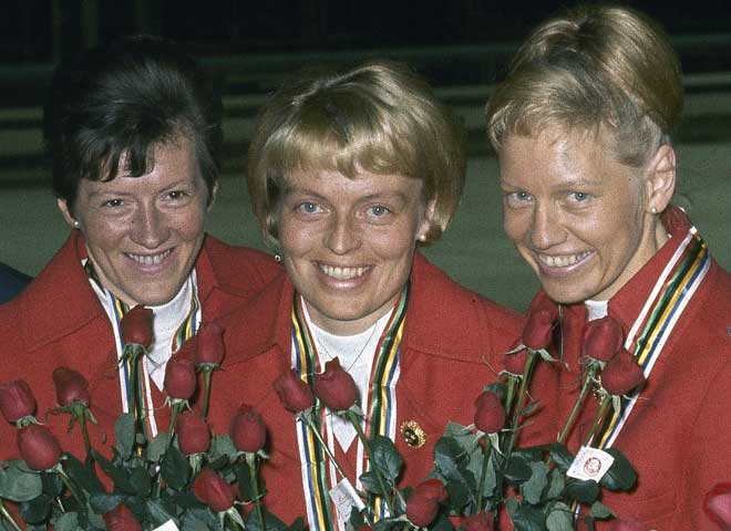 Inger Aufles, Babben Enger Damon og Berit Mørdre Lammedal vant langrennstafetten i Grenoble i 68.